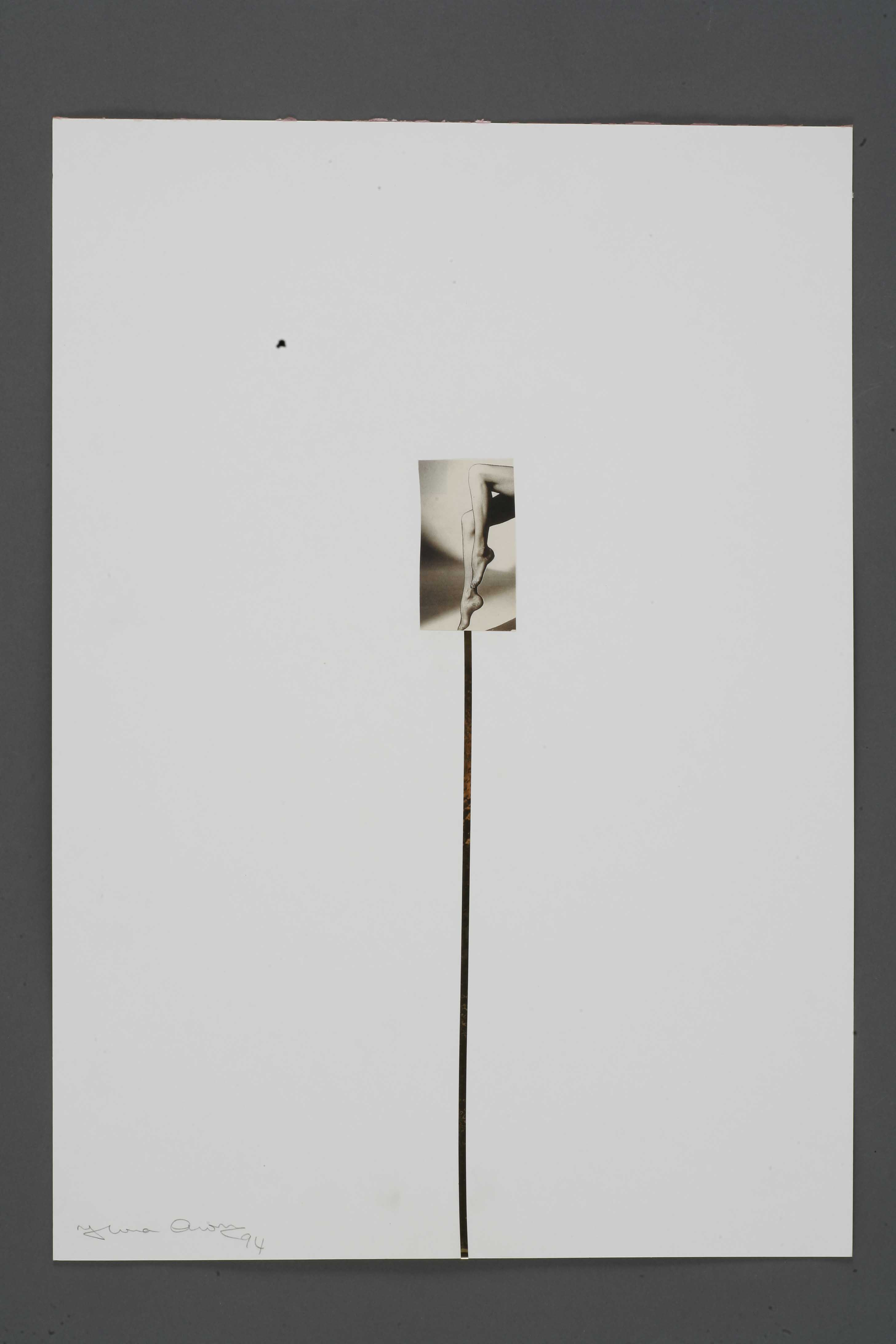 קולאז', עבודה של האמנית אילונה אהרון